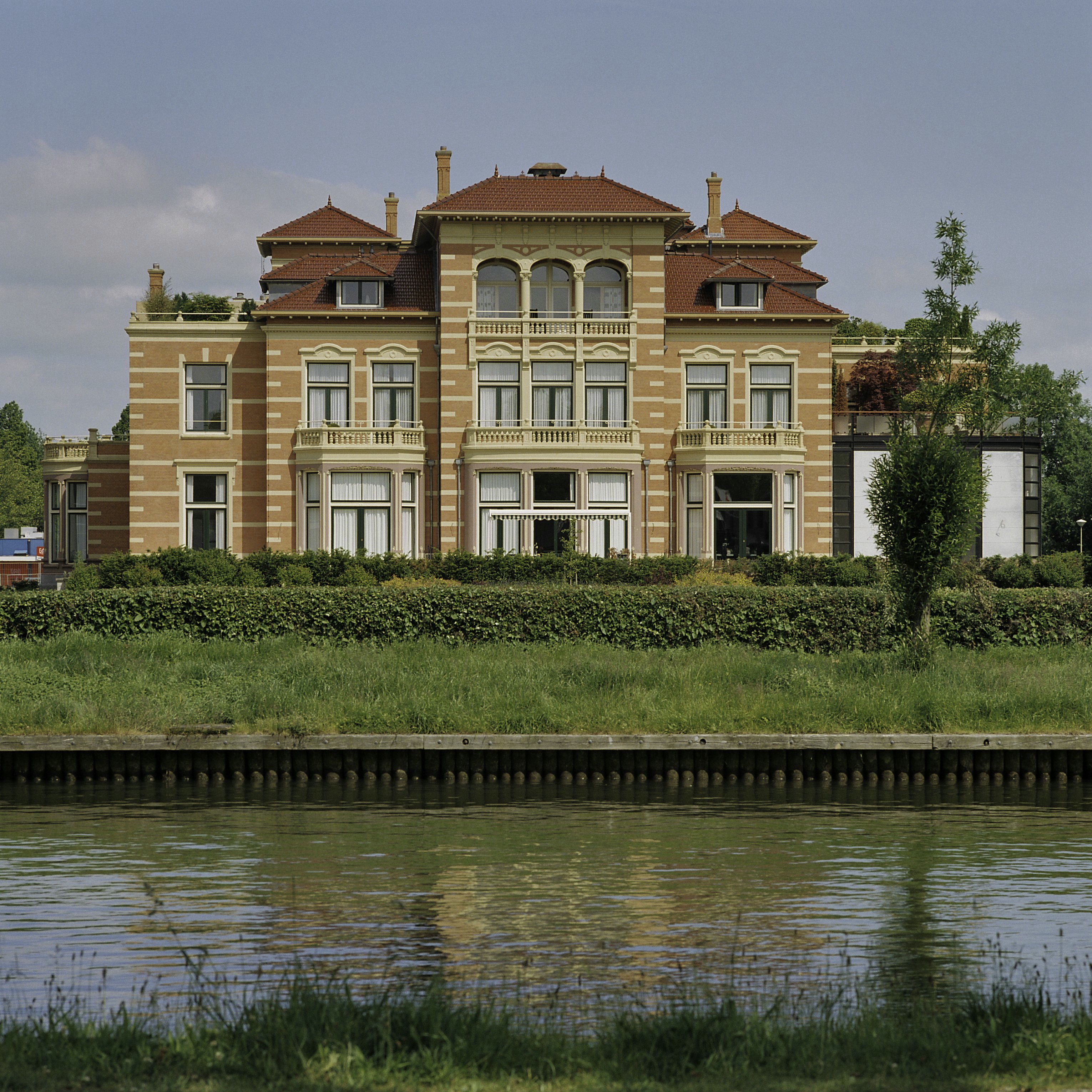 Villa Casparus: Overzicht achtergevel gezien vanaf overzijde (opmerking: Gefotografeerd voor Monumenten In Nederland Noord-Holland)